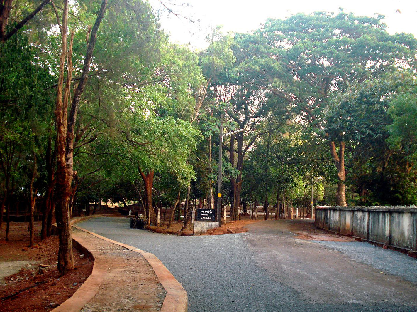 St. Anjolos fort Kannur (Kannur kotta) ഇടതുവശത്തുള്ള റോഡിലൂടെ പോയാൽ കണ്ണൂർ കോട്ടയിൽ എത്താം.